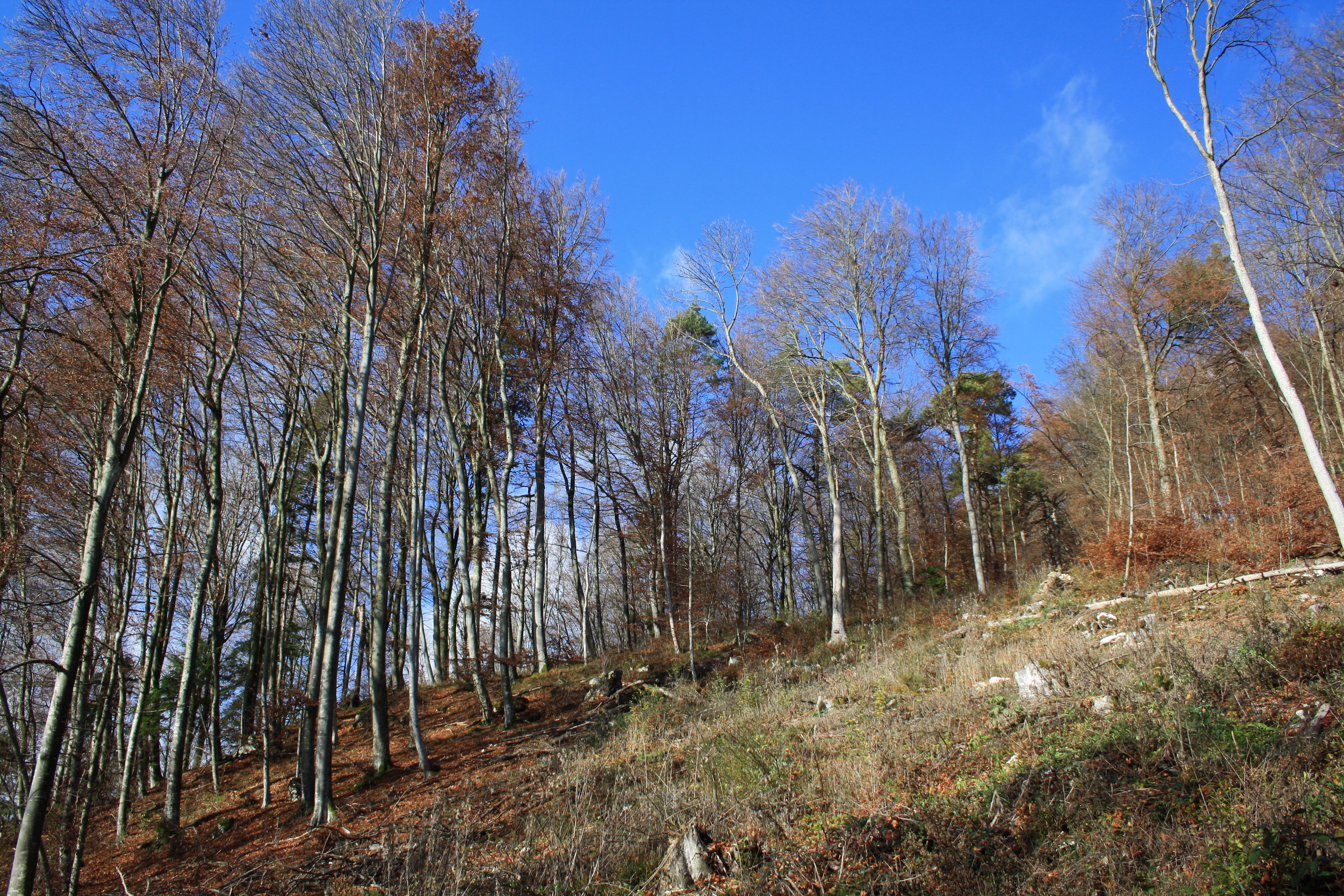 Lägern